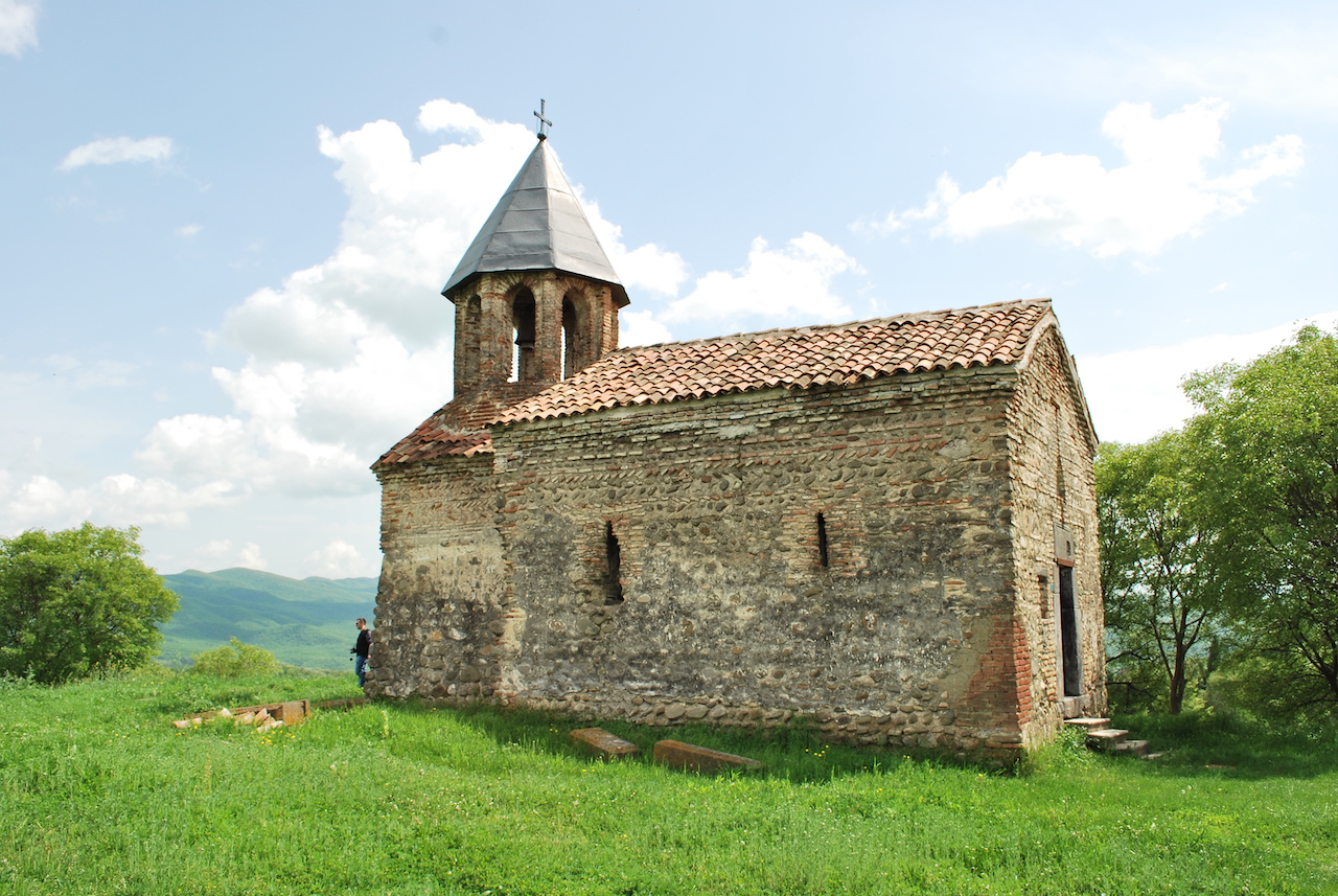 „ალავერდის“ ეკლესია